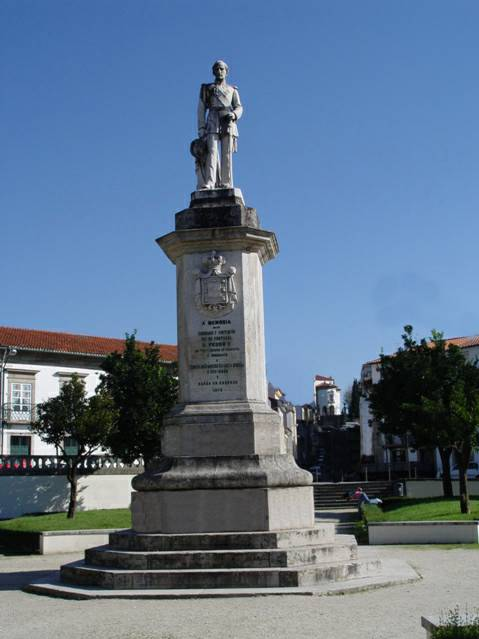 D. Pedro V statue in Campo Novo (Praça de Mouzinho de Albuquerque), Braga, Portugal